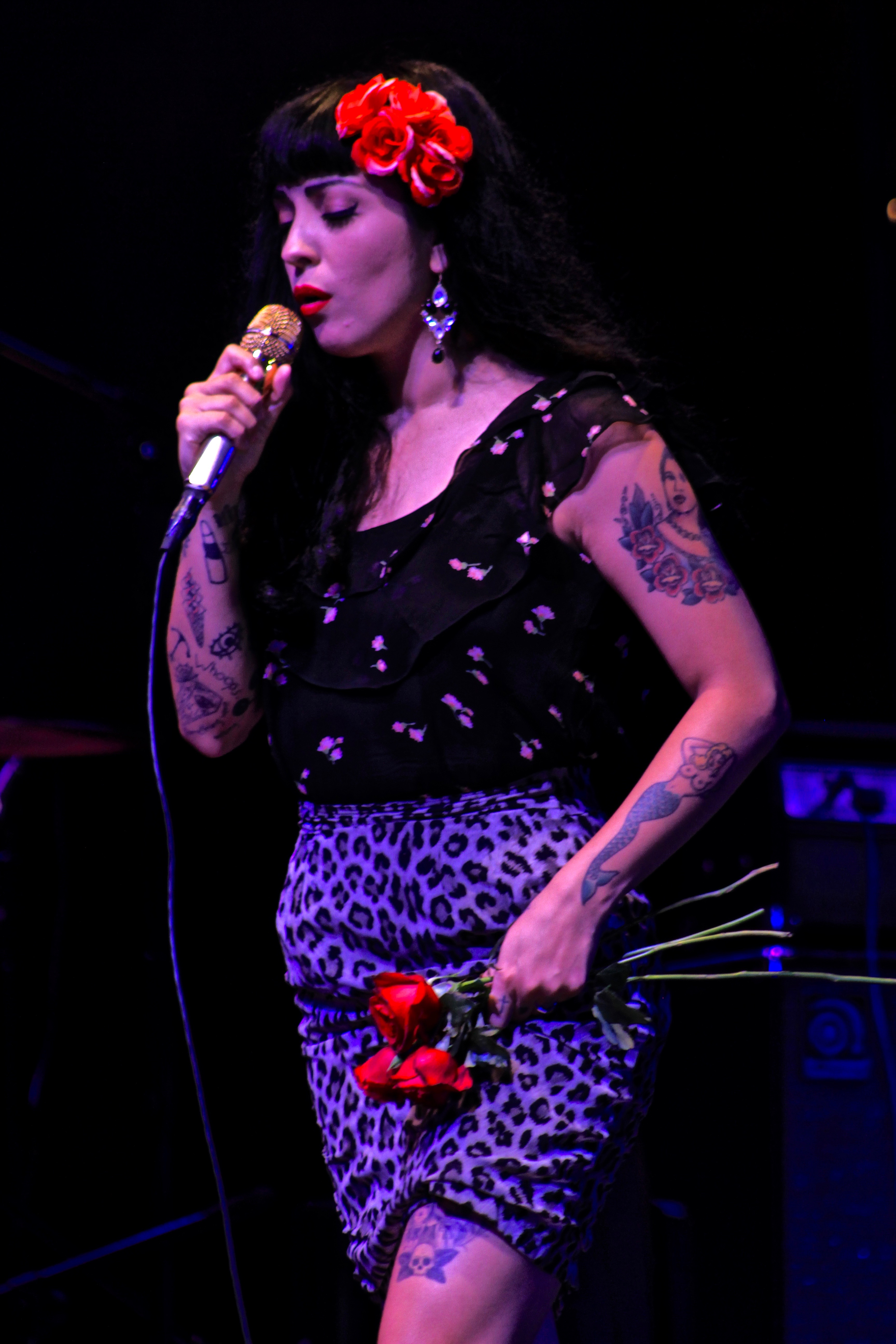 Mon Laferte en Querétaro